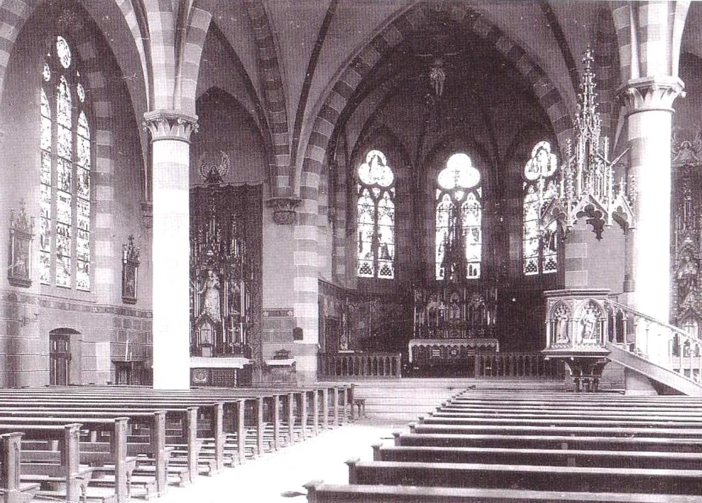 Maria Geburt Schweinheim - neuerbaute Kirche um gotischen Stil um 1900 (Innenansicht)